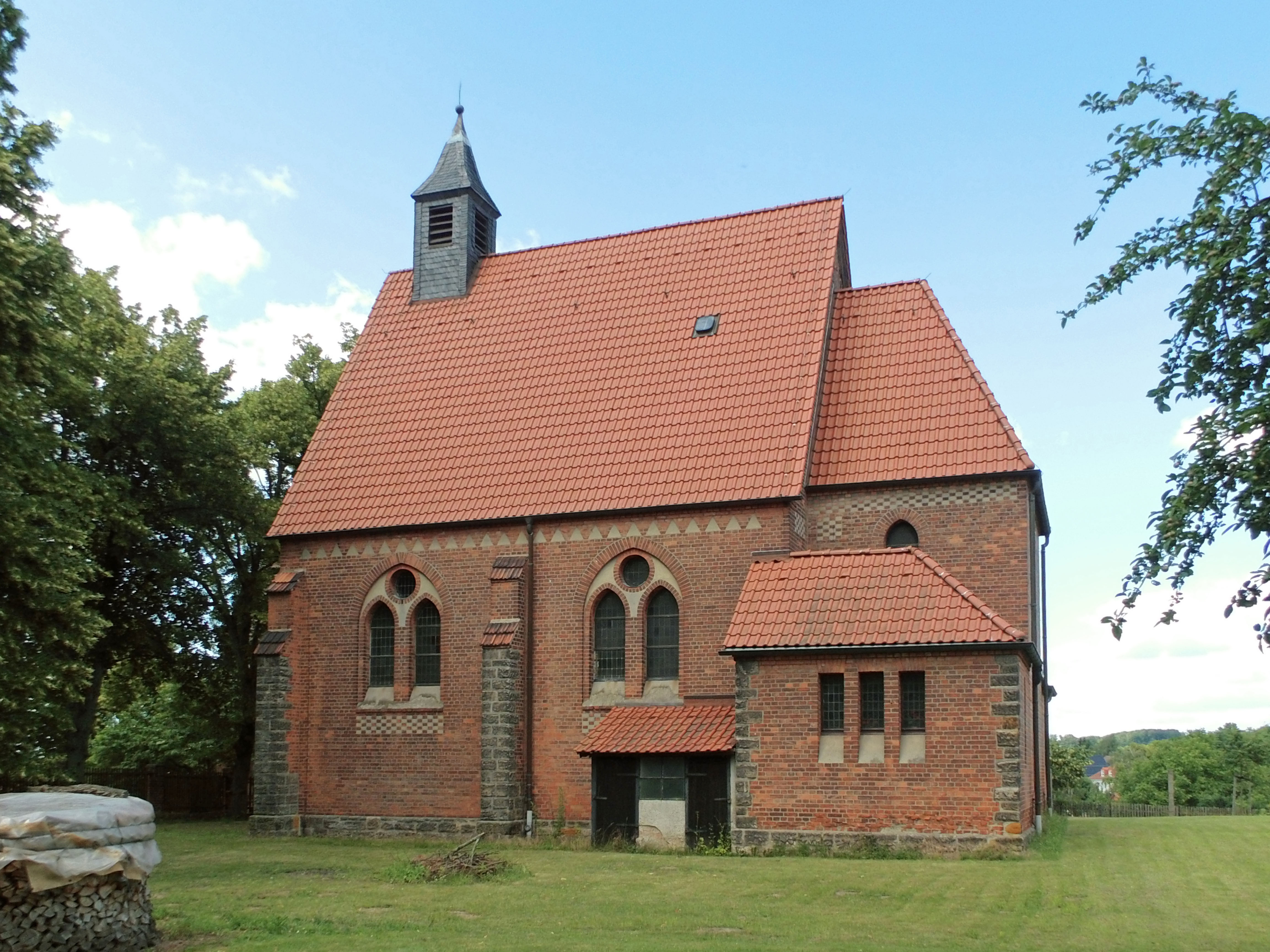 Katholische Kirche St. Josef in Harbke (Sachsen-Anhalt), gebaut nach Plänen des Berliner Architekten August Kaufhold